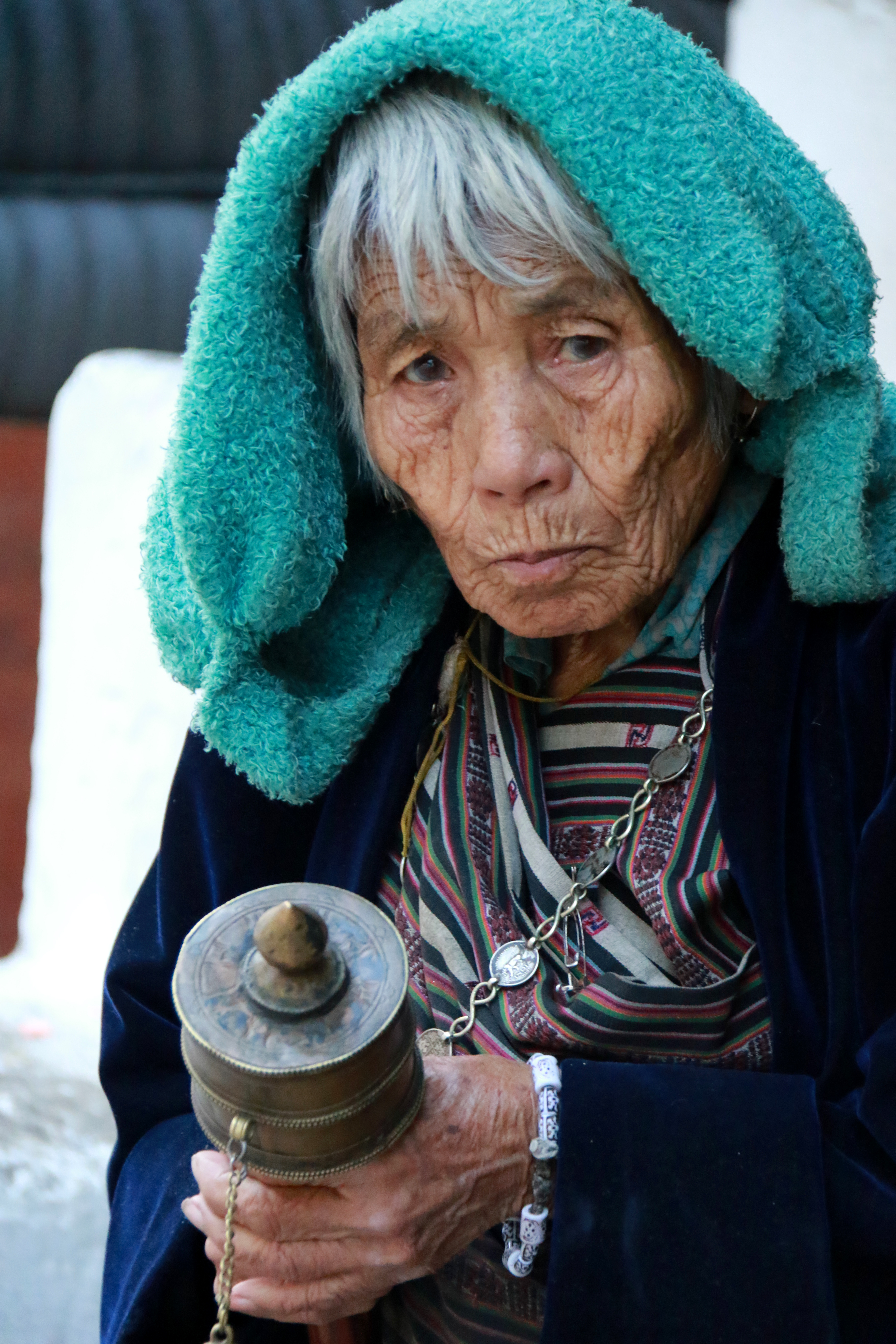 Bouthan, femme avec son moulin a prière